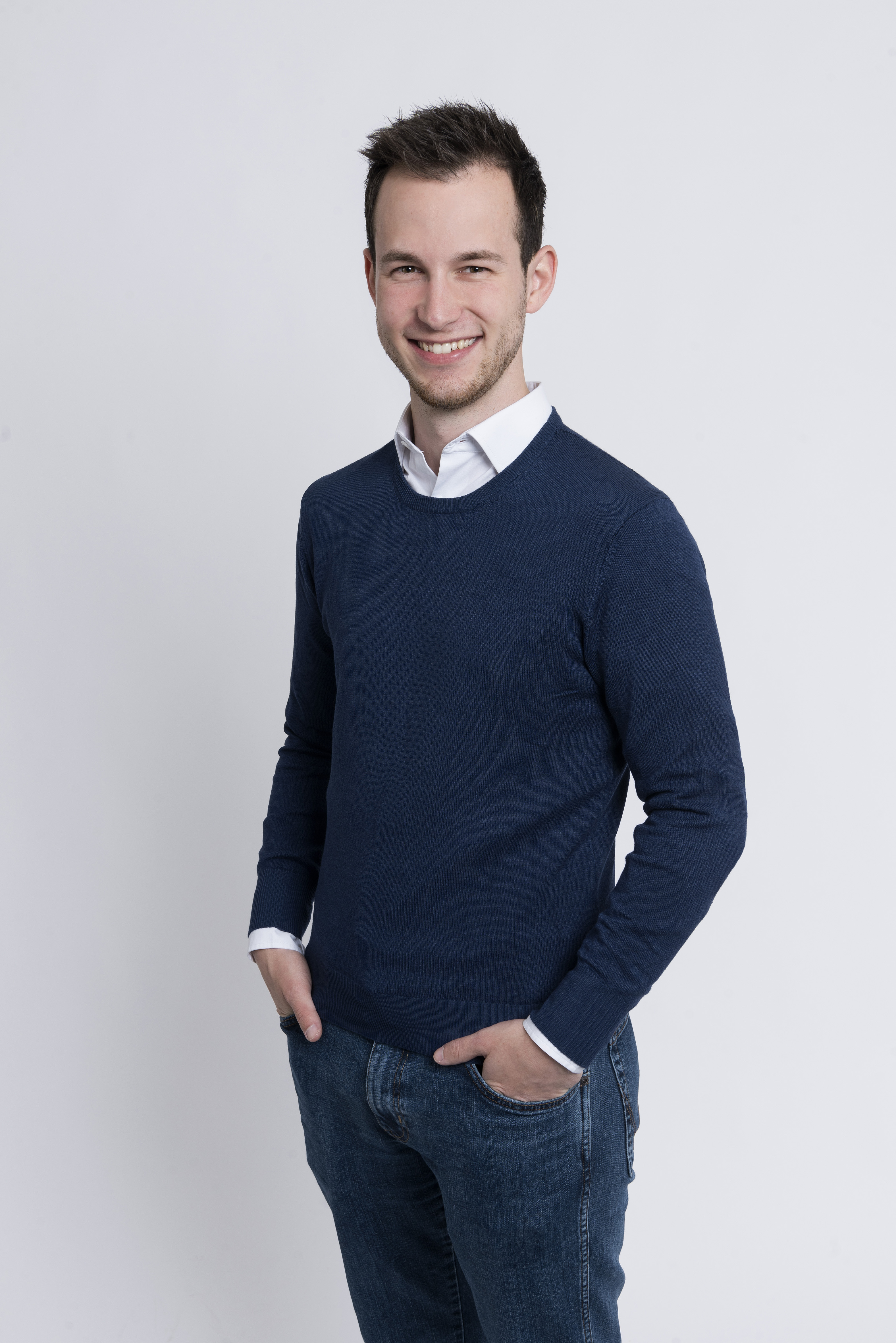 Remo Zuberbühler, Kandidatenportrait Wahlen 2019